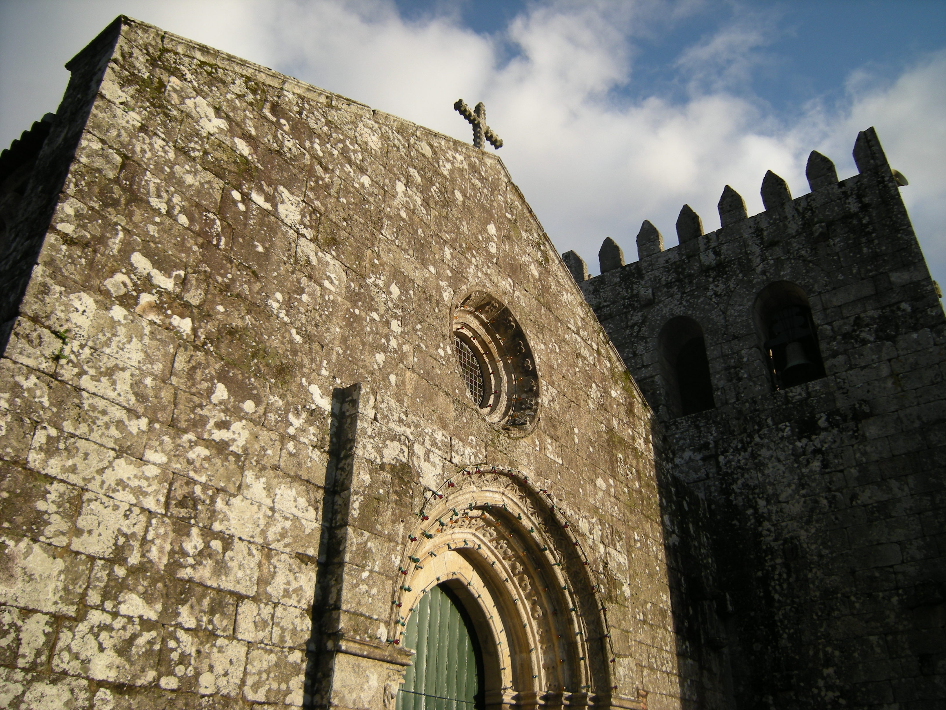 Hastial occidental y torre de las campanas.